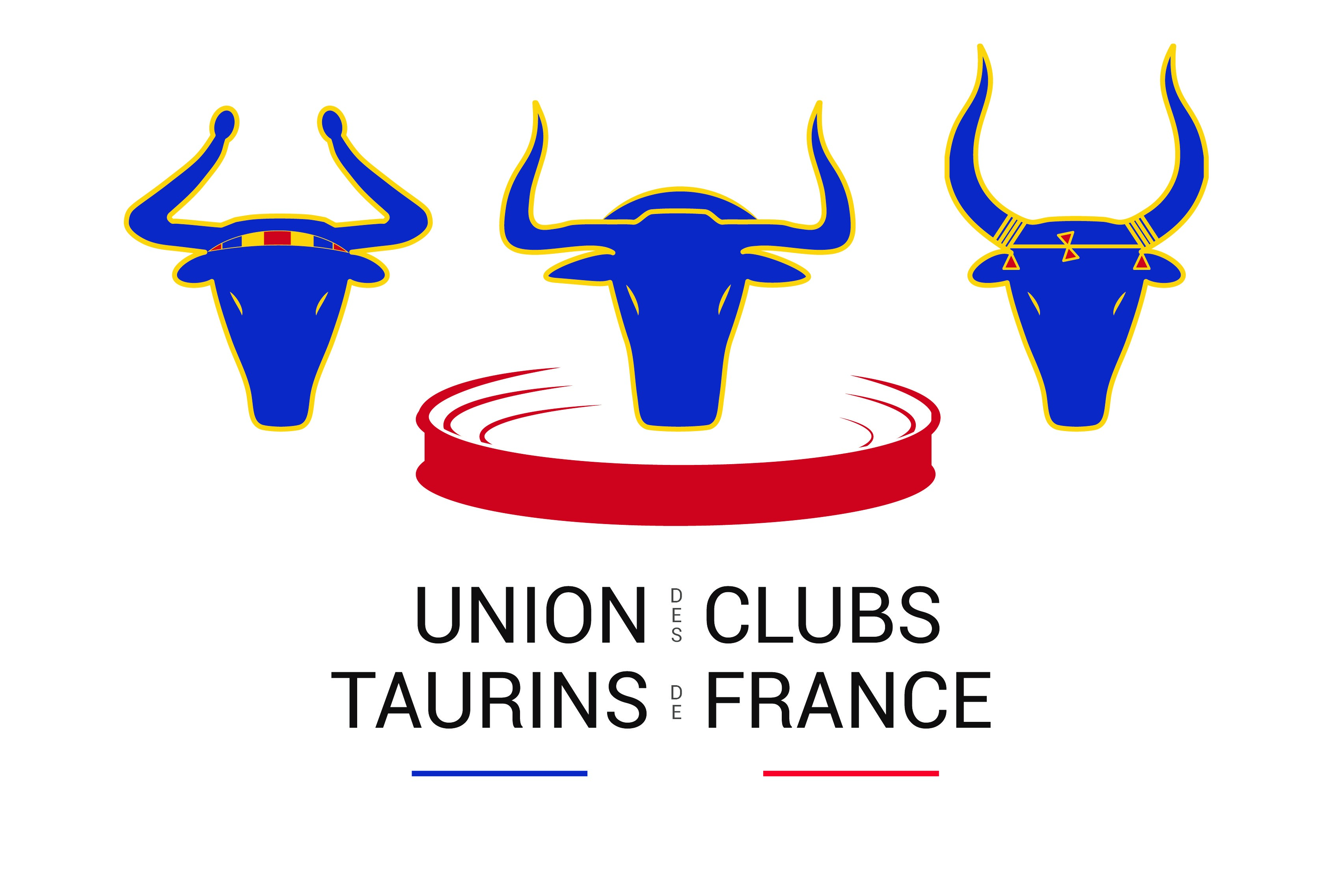 Trois tauromachies sur fond d'arène et couleurs de la France